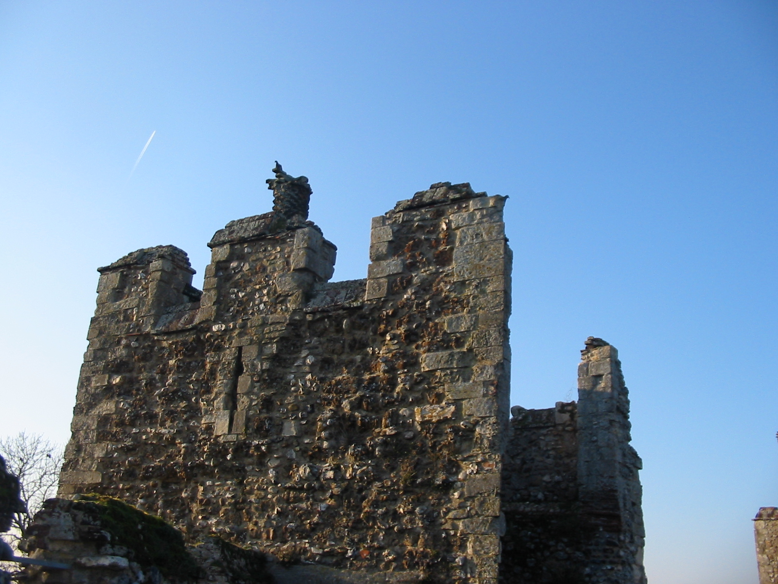 Руины замка Фрамлинген — родового замка Гуго Биго.